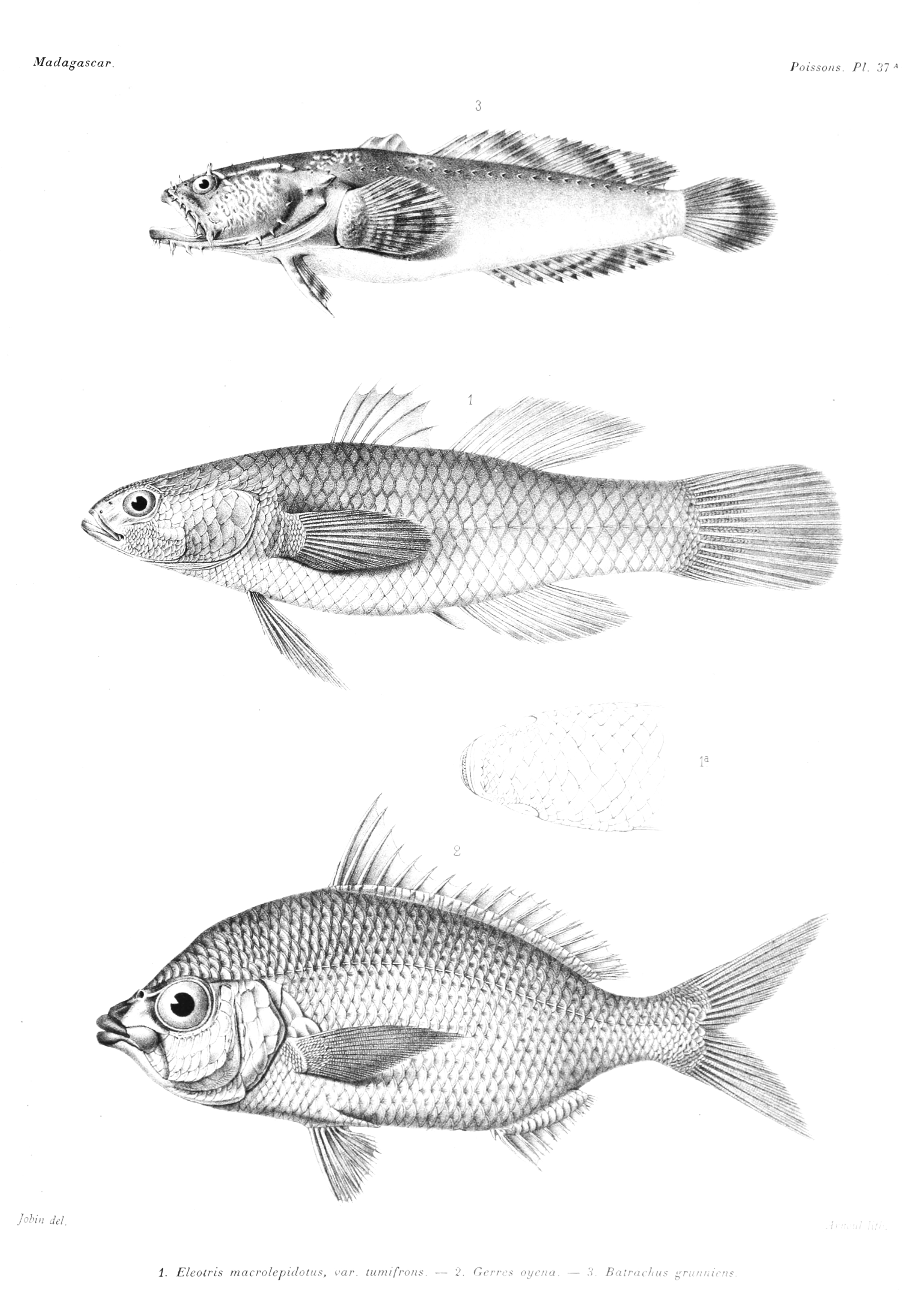 Eleotris macrolepidotus var tumifrons (=Ophiocara macrolepidotus or Ophiocara aporos) Gerres oycna Batrachus grunniens (=Allenbatrachus grunniens)